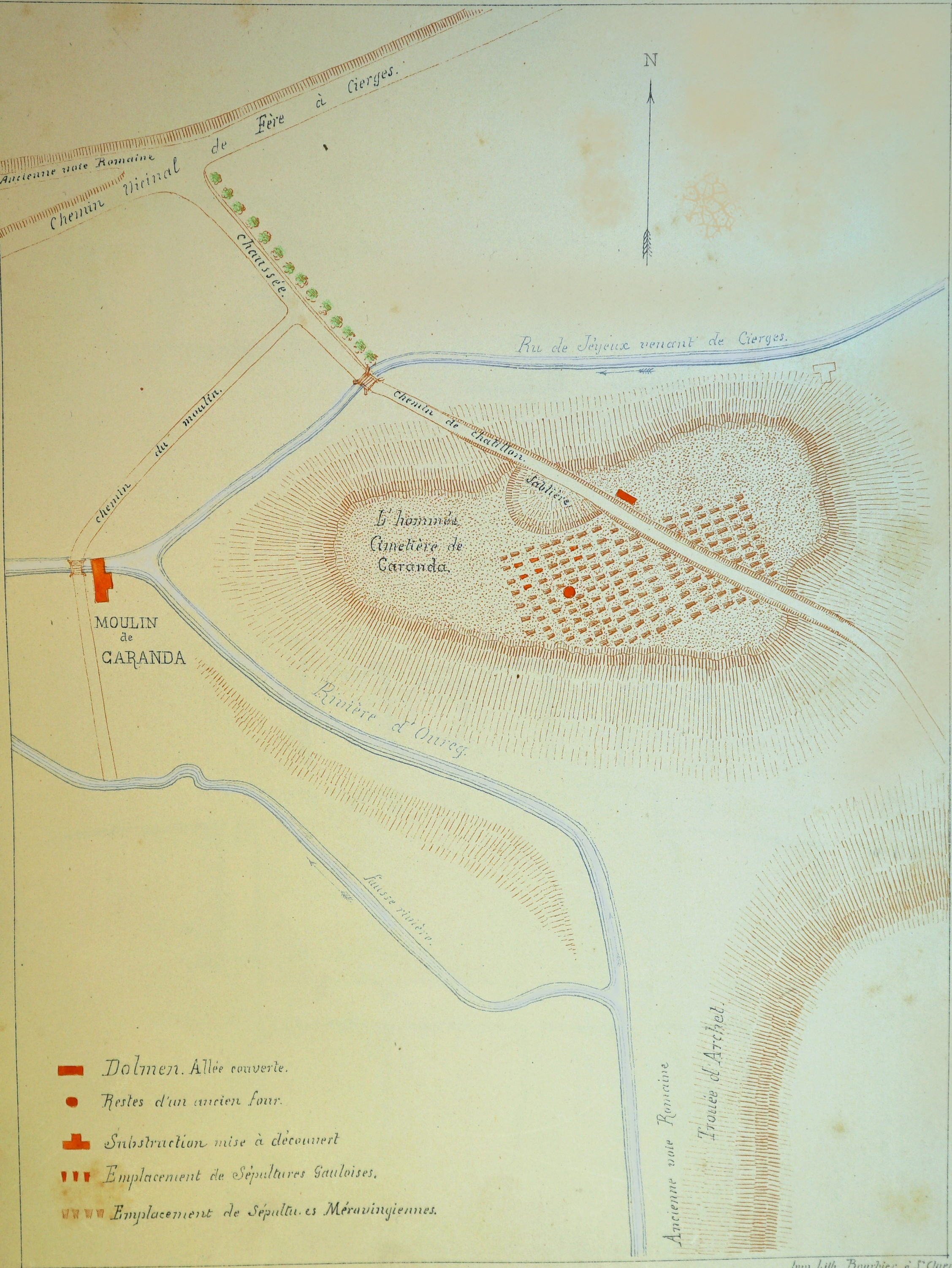 publié par Moreau.